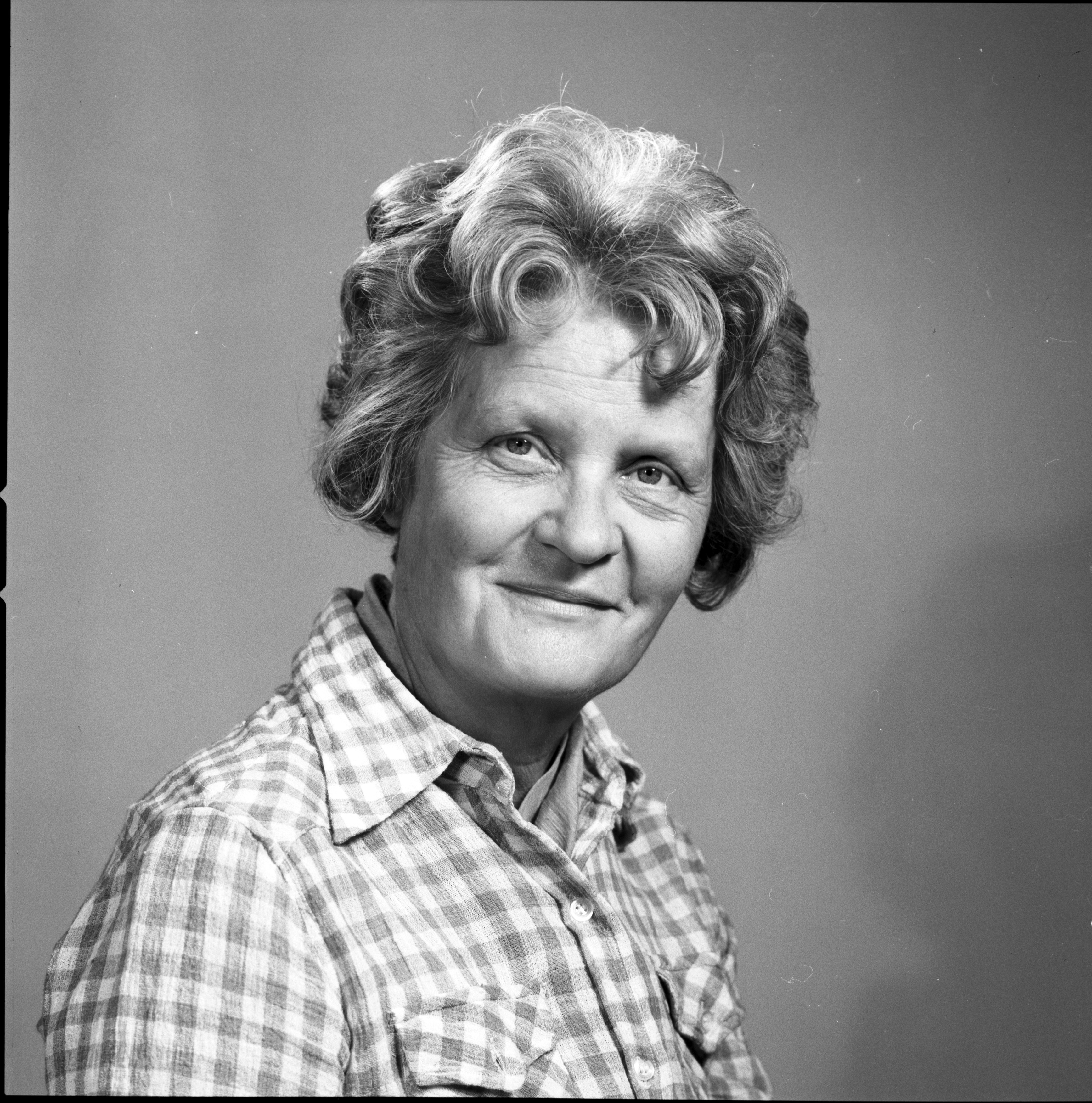 Arkeolog Charlotte Blindheim